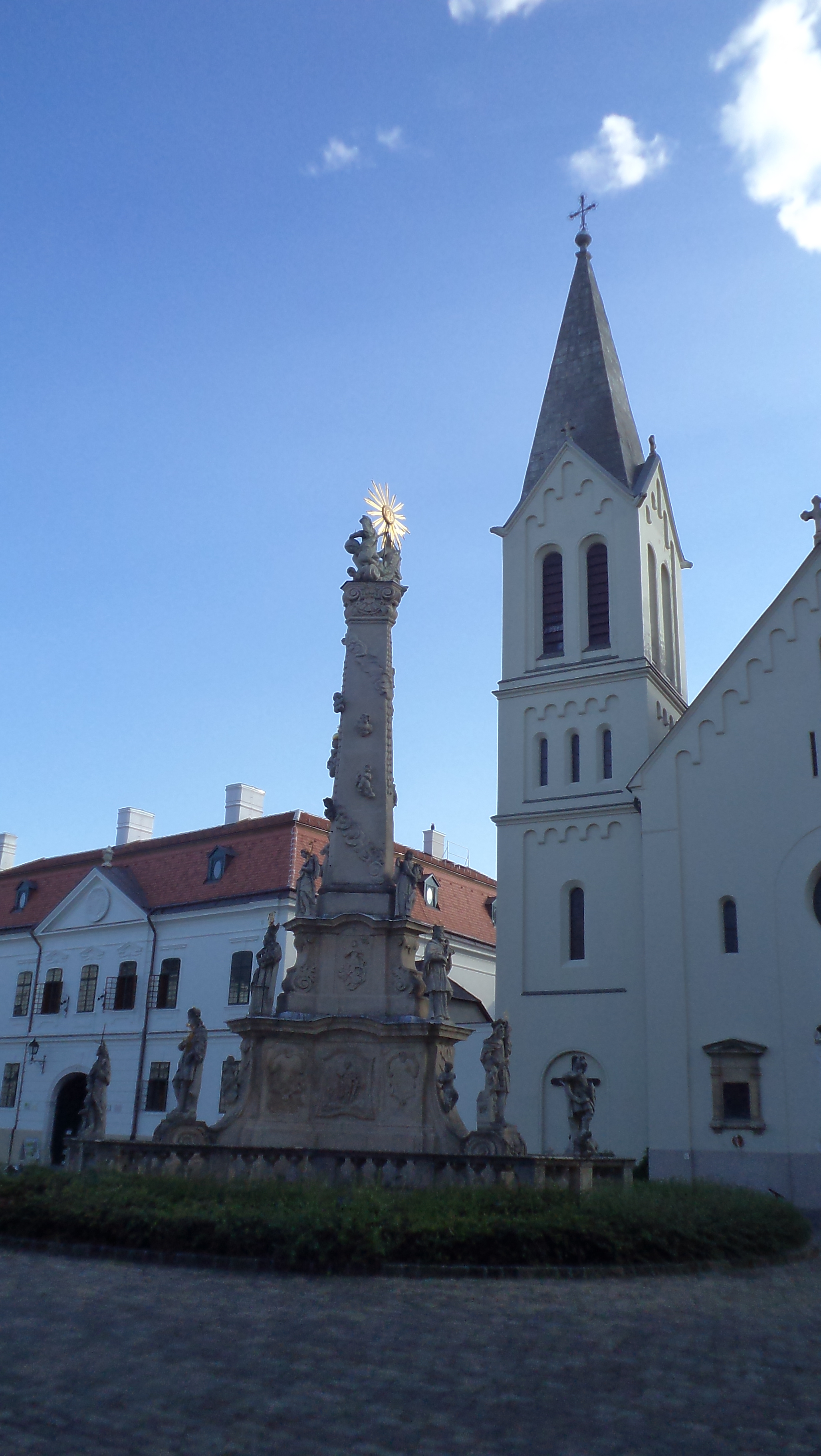 Veszprém